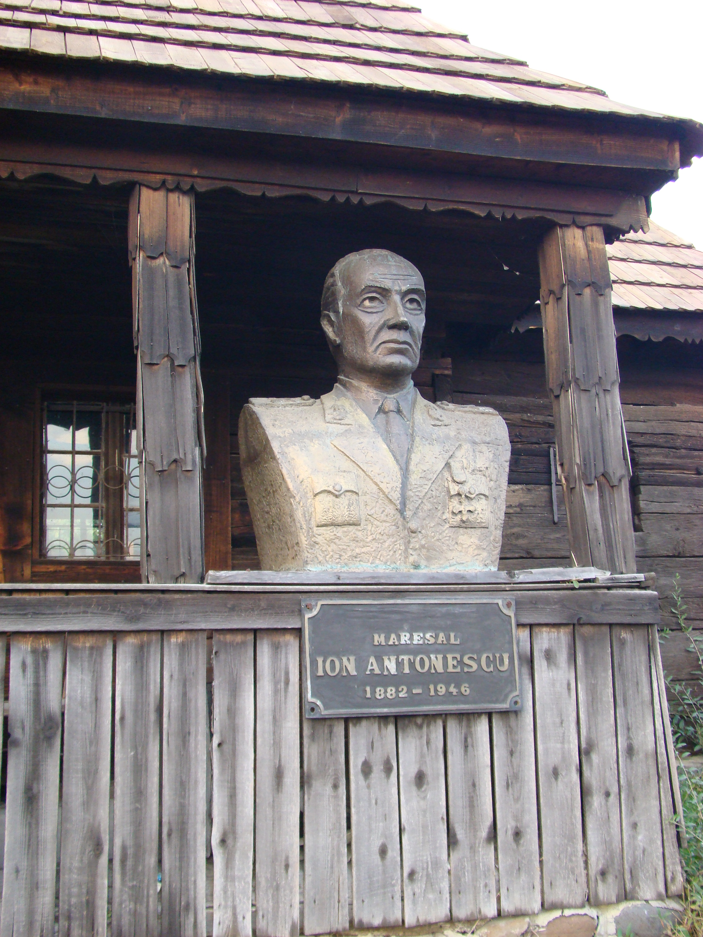 Biserica de lemn „Sf.Arhangheli” din Sărmașu, județul Mureș